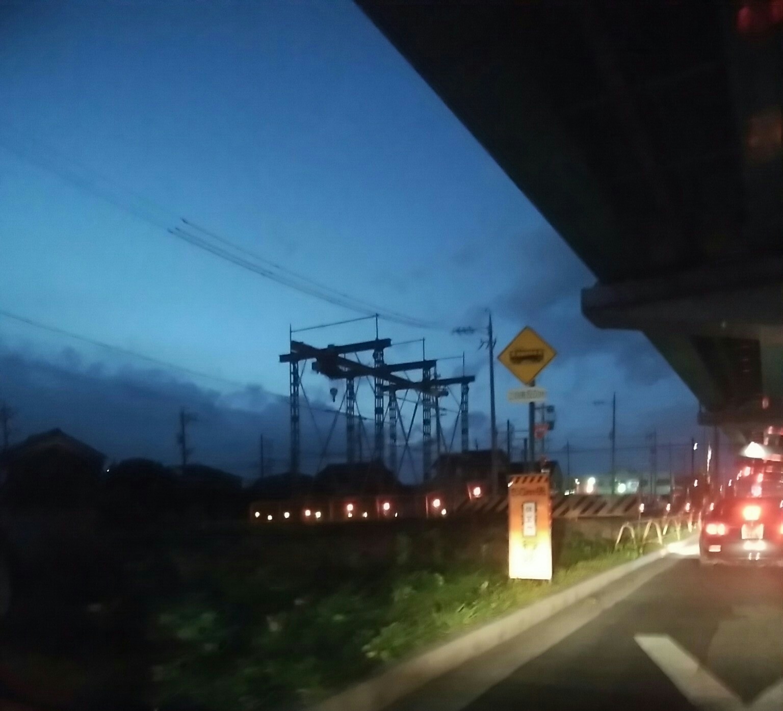 名鉄尾西線苅安賀駅ー観音寺駅付近の高架事業